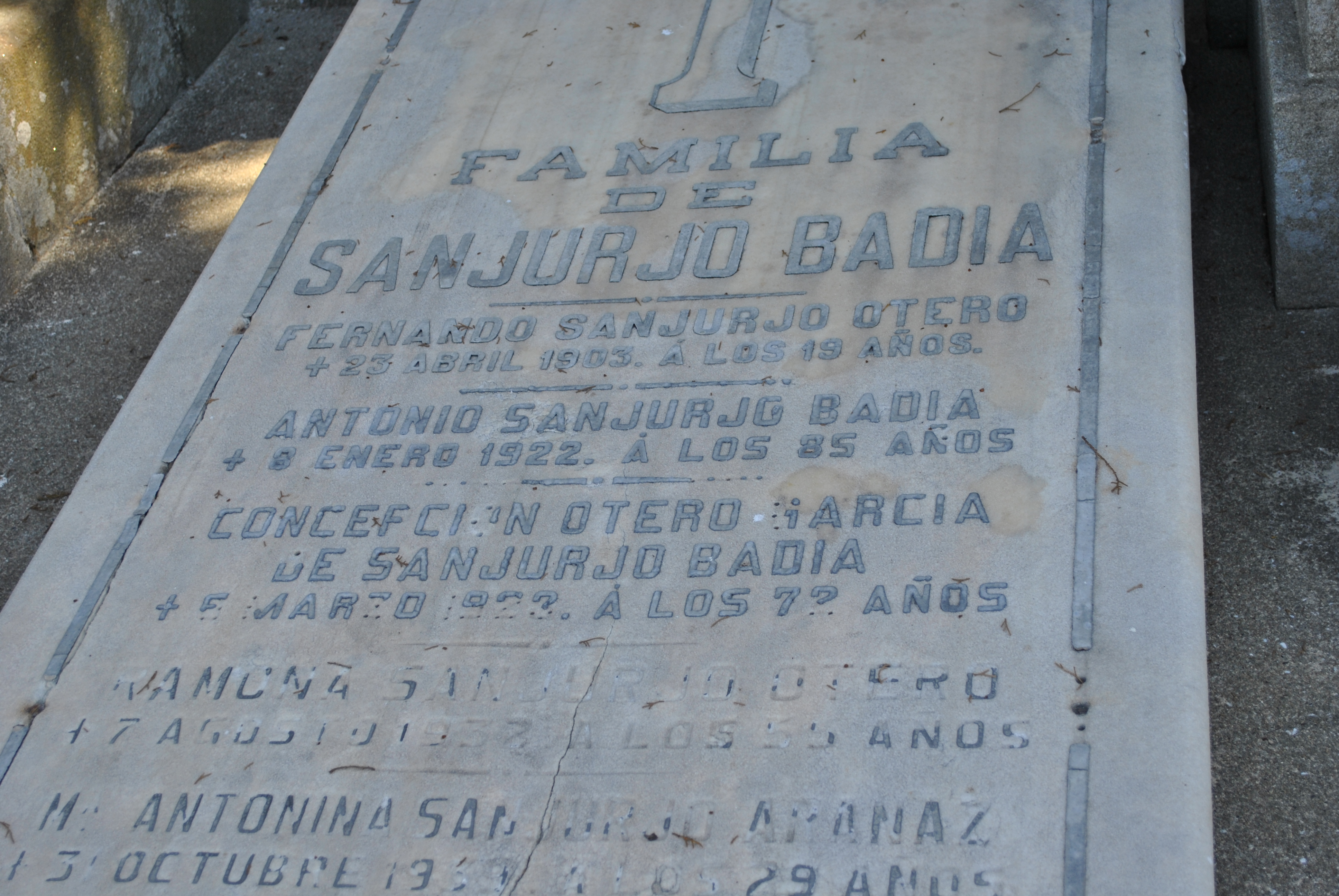 Familia de Antonio Sanjurjo Badía.jpg